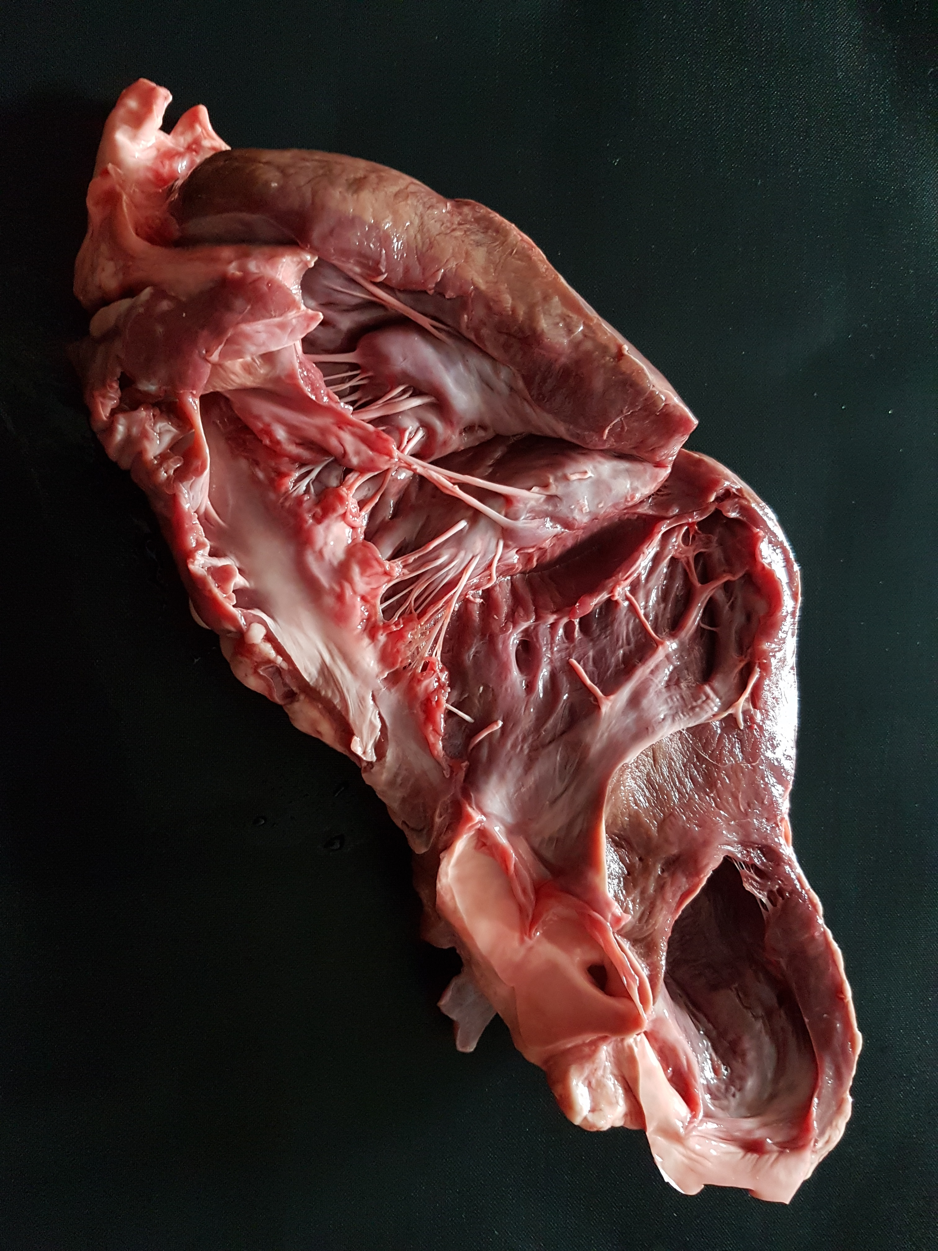 Kalbsherz, vom Fleischer vorbereitet, ohne Herzbeutel und Herzklappen